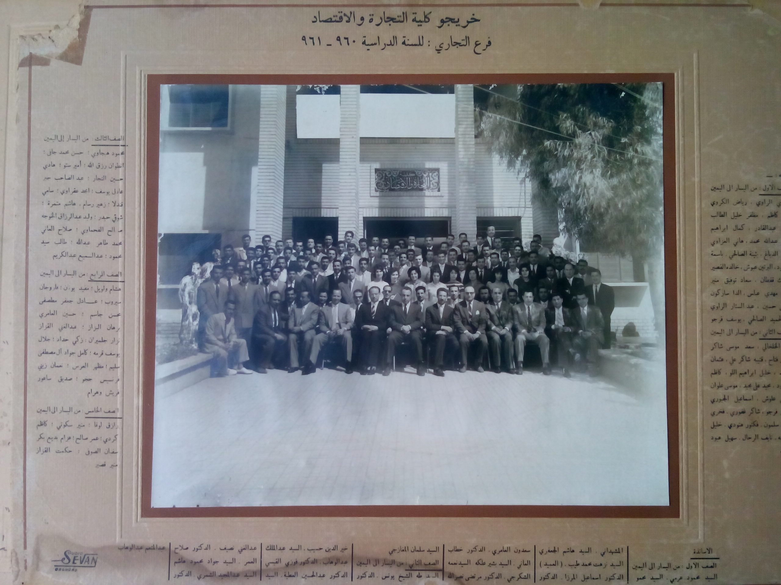 أخذ هذا التصوير في مبنى كلية التجارة والاقتصاد في بغداد لخريجوا الفرع التجاري للعام الدراسي 1960-1961 ، ويظهر فيه الثاني من اليسار في الصف الثاني سعد موسى آل شاكر.